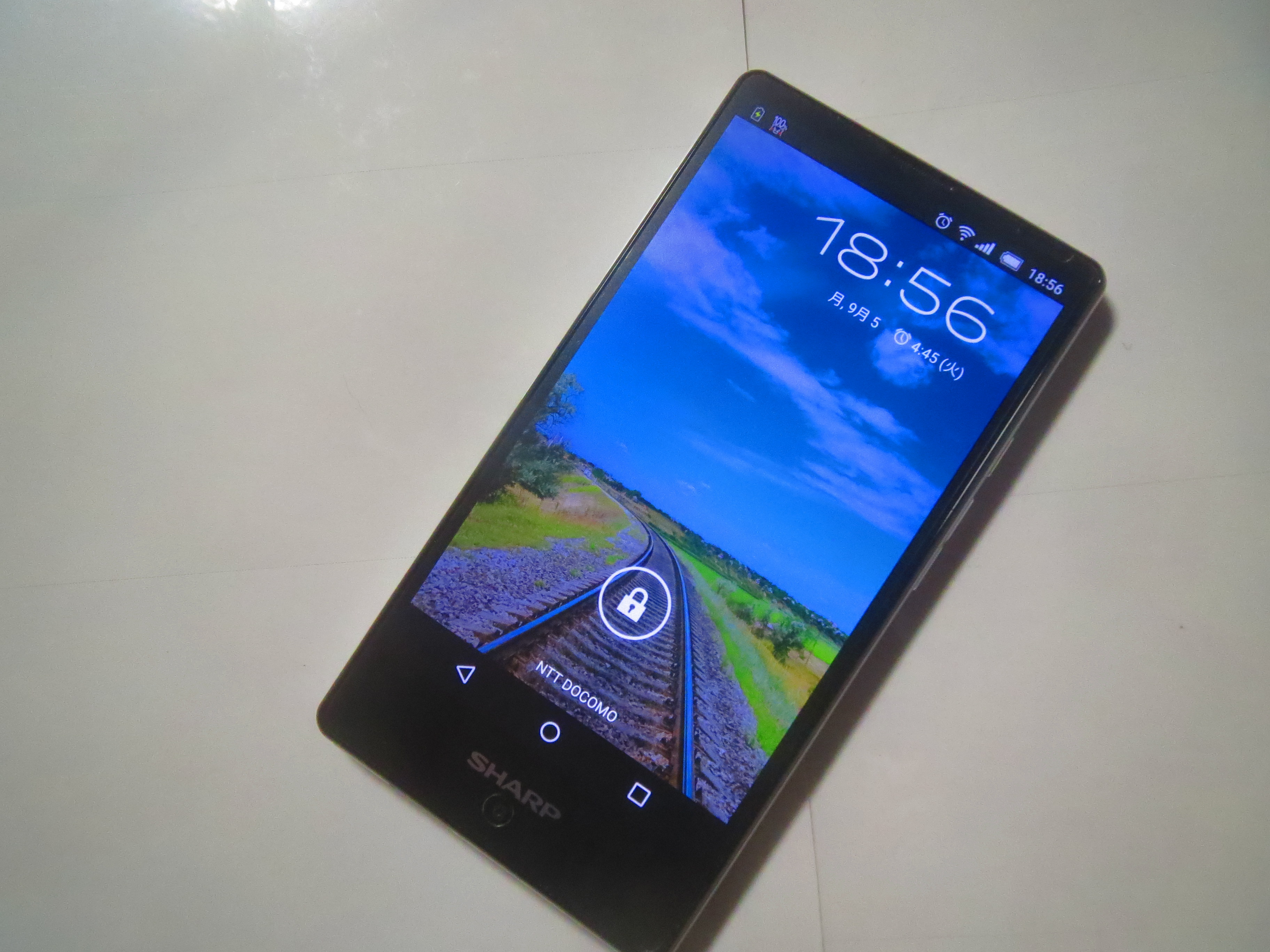 シャープAQUOS mini SH-M03